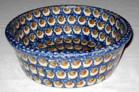 Schüssel mit Pfauenaugendekor, Bunzlau